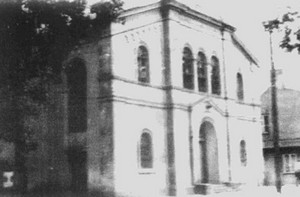 Synagoga w Turku - lata powojenne